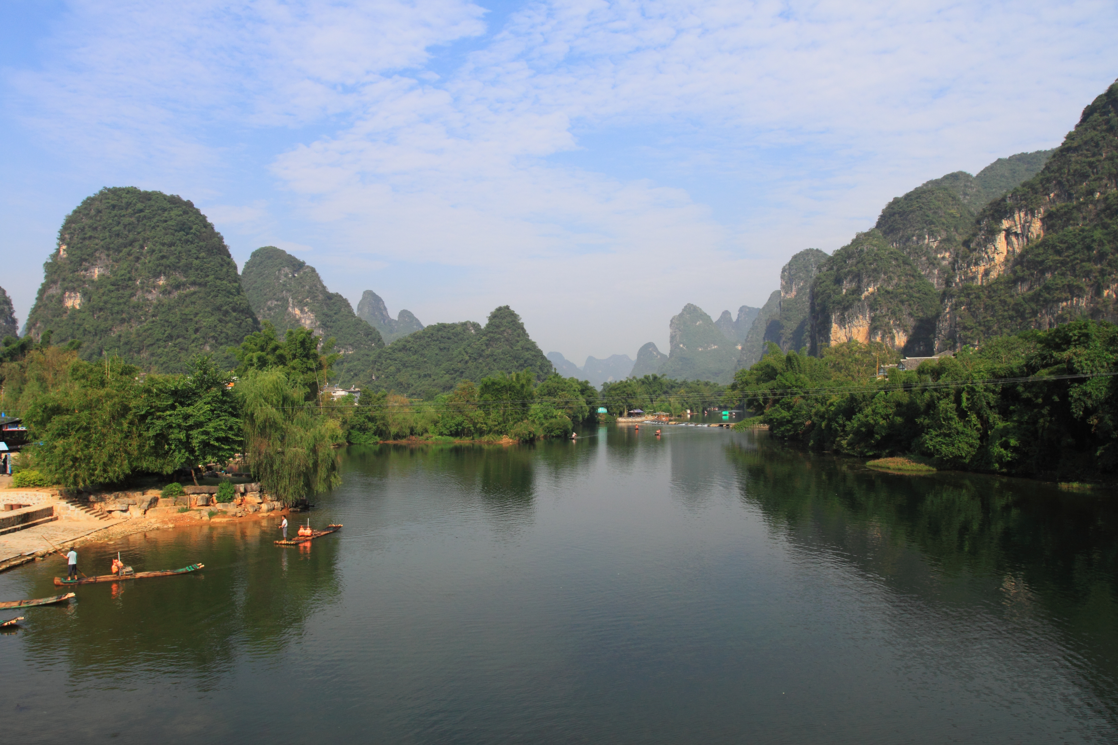 阳朔县遇龙河 —— 工农桥上北望